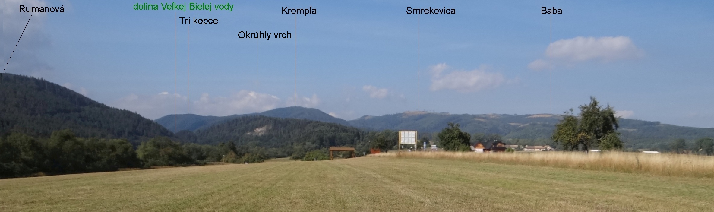 Slovenský raj